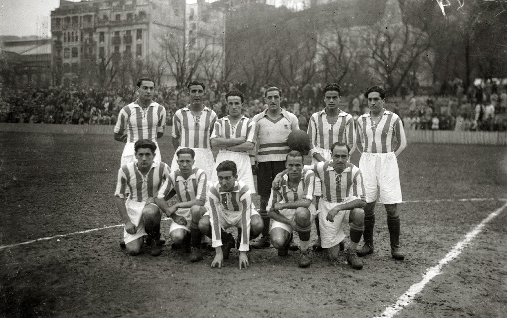 Título original: La Real Sociedad en el primer partido de Liga de Primera División en el campo de Atotxa (4/4) Localización: San Sebastián (Guipúzcoa)